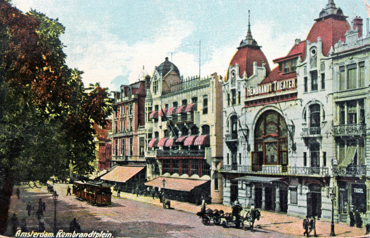 Rembrandtsplein ansichtkaart